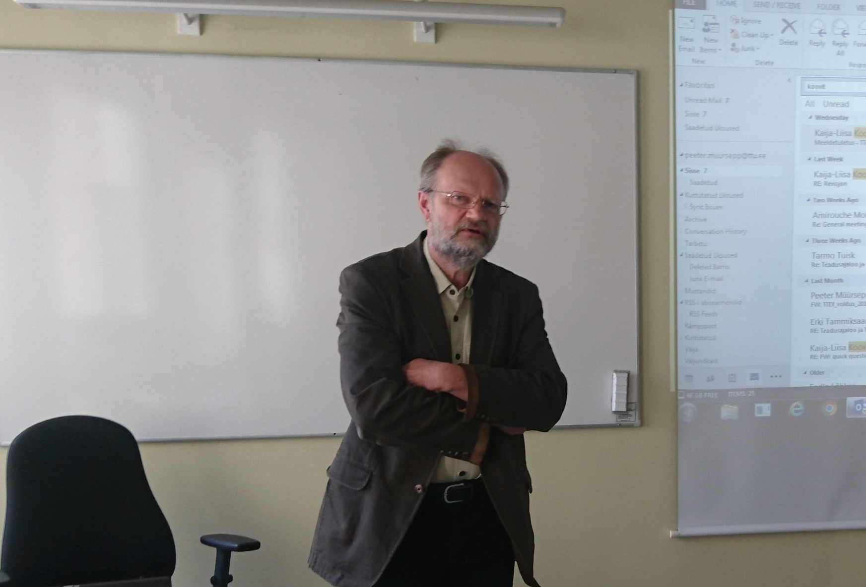 Teadusfilosoof Peeter Müürsepp juunior Teadusajaloo ja Teadusfilosoofia Eesti Ühenduse koosolekul 25. mail 2018